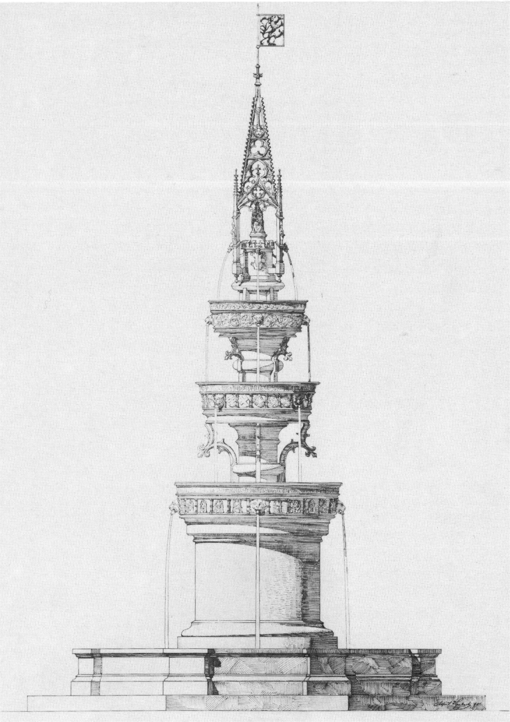 Braunschweig: Erste maßstäbliche Zeichnung des Marienbrunnens von A. Heubach aus dem Jahre 1901. Braunschweig, Germany: First scale drawing of St. Mary’s Fountain by A. Heubach from 1901.